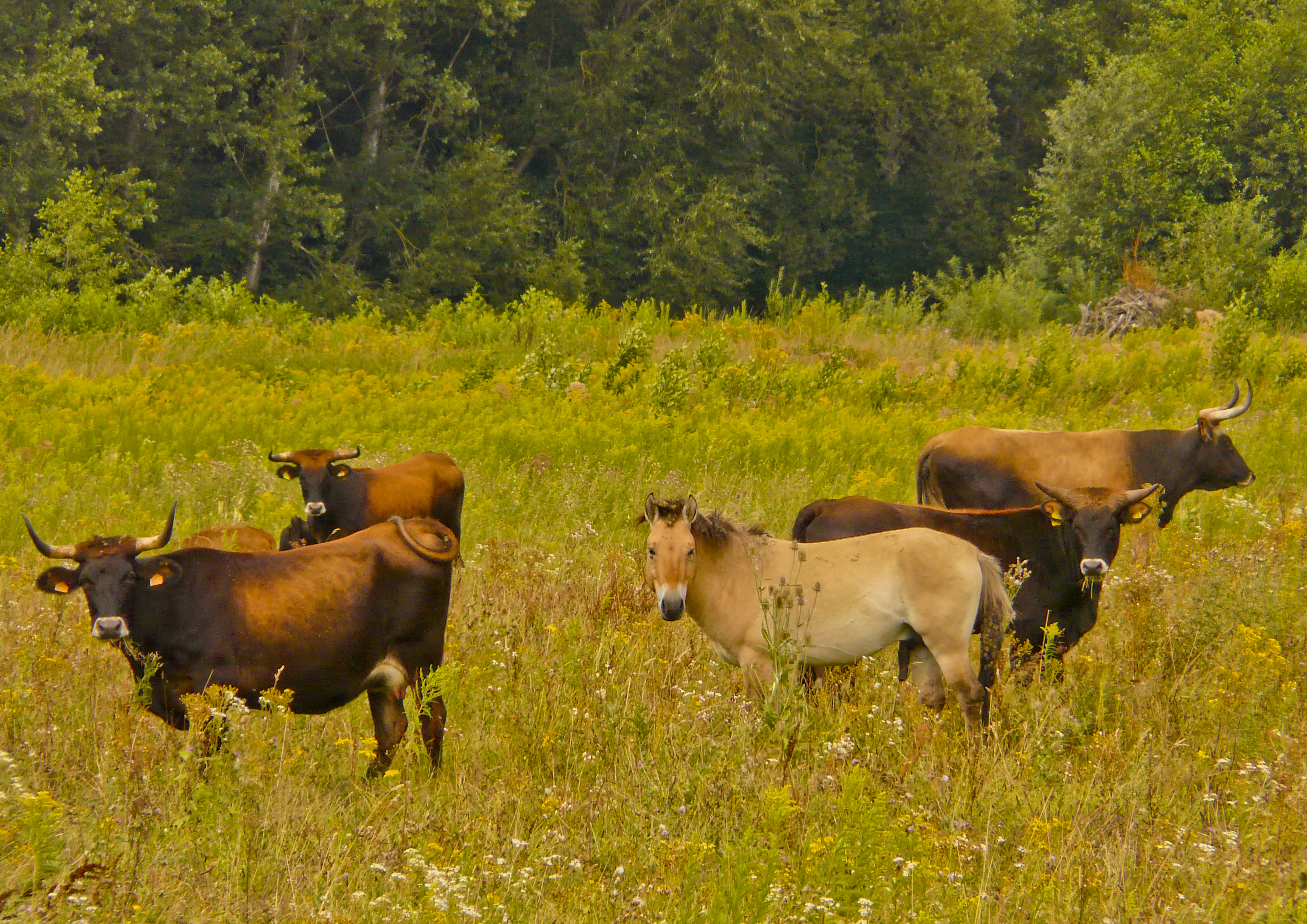 „Wilde Weide" im NSG Lippeaue mit Taurusrindern und Konik